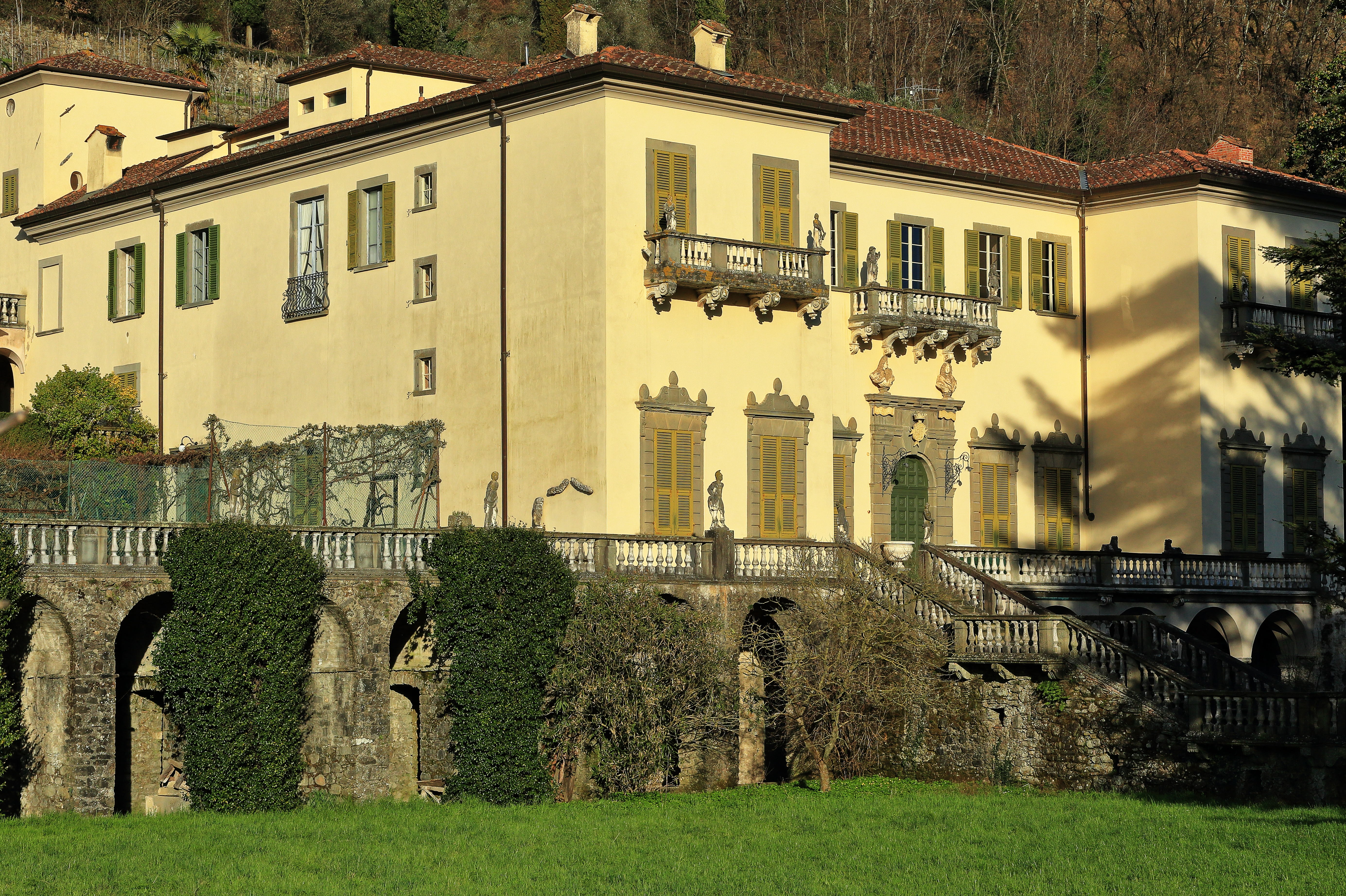 Facciata principale di Villa Dosi Delfini